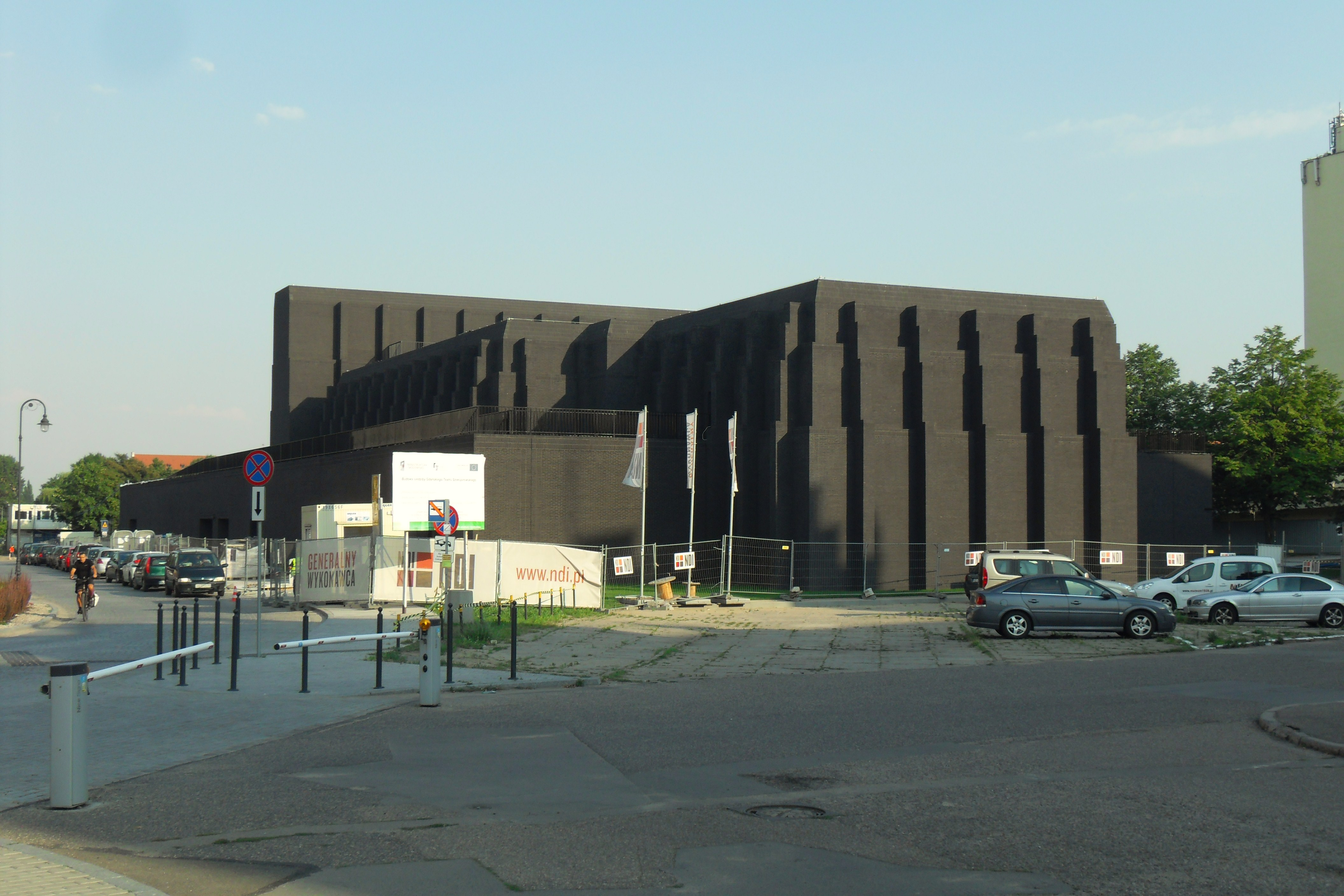 Teatr Szekspirowski w Gdańsku (w budowie), sierpień 2014. Teren, na którym istniała Wielka Synagoga.